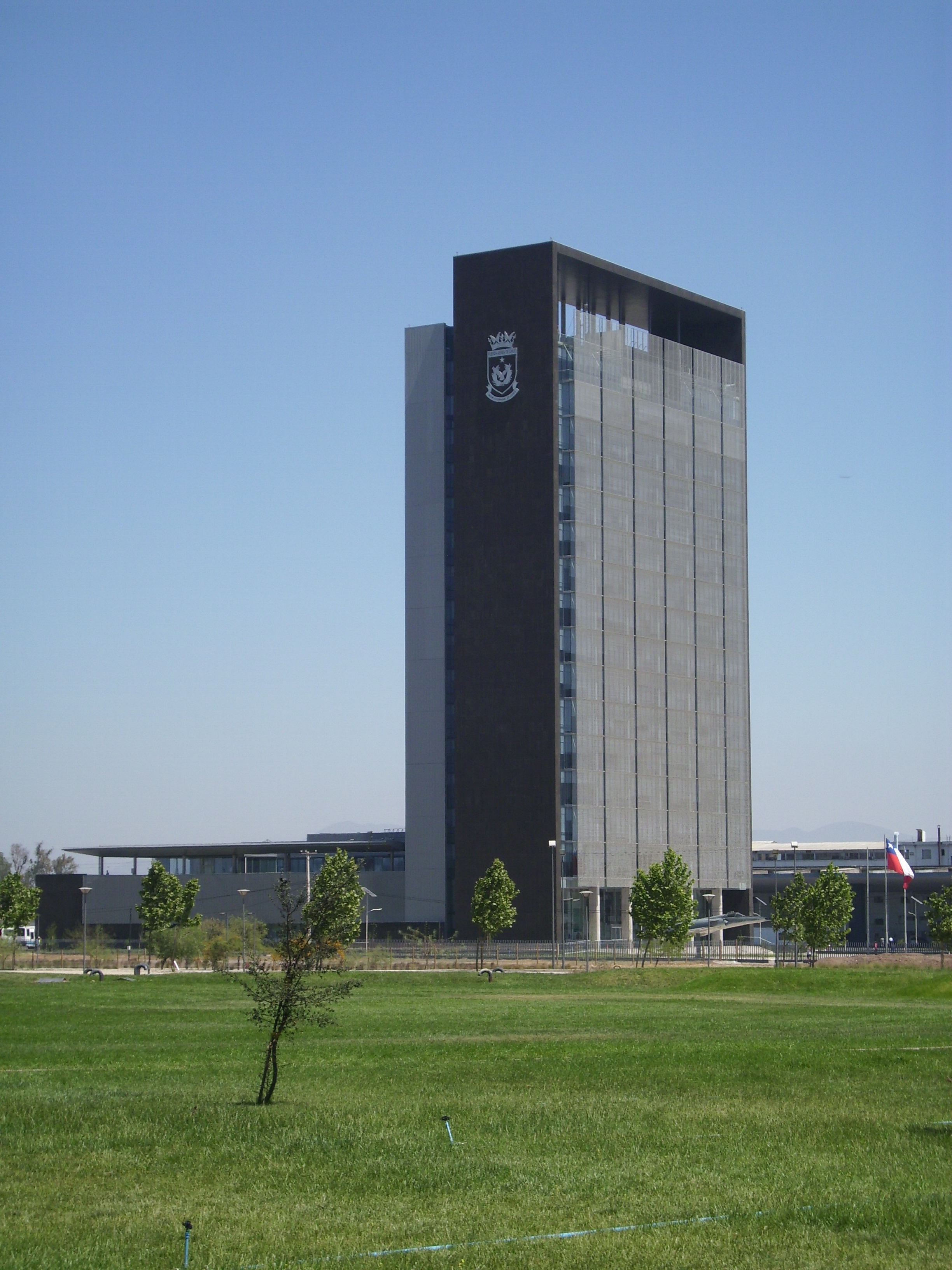 El edificio Delphos de la Fuerza Aérea de Chile visto desde el parque Portal Bicentenario en la comuna de Cerrillos, Santiago de Chile.